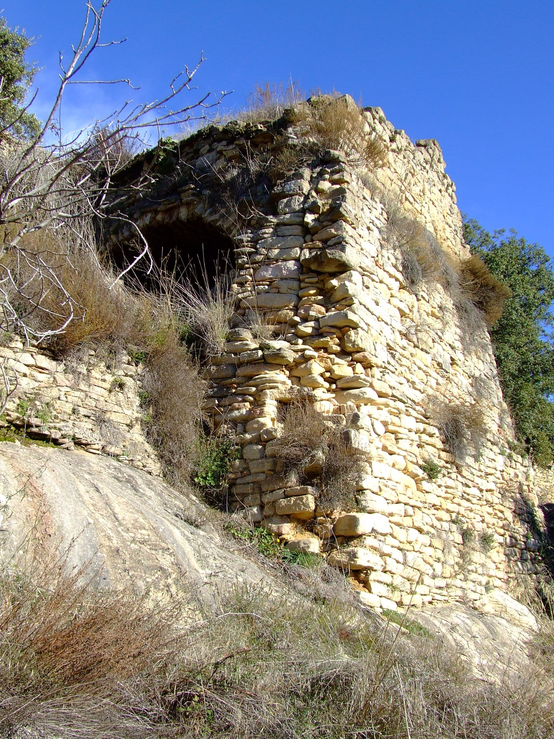 Torre de defensa del castell de Biscarri (Benavent de la Conca, Isona i Conca Dellà, Pallars Jussà)